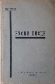 Издање књиге есеја Петра Митропана „Руски писци“ из 1934. За чланак: Петар Митропан